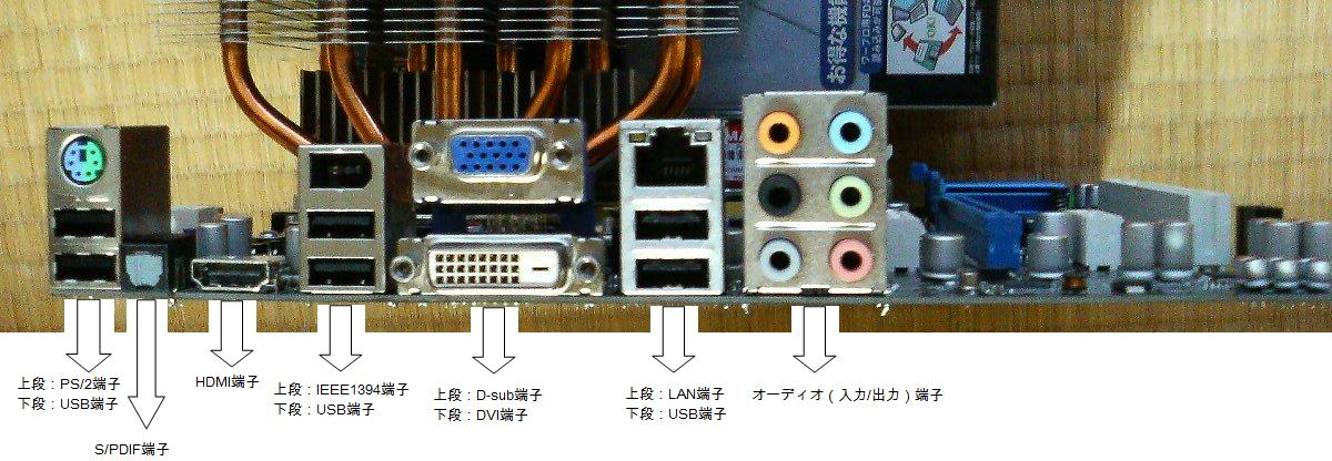 ASUS製P5Q-EMのバックパネル。